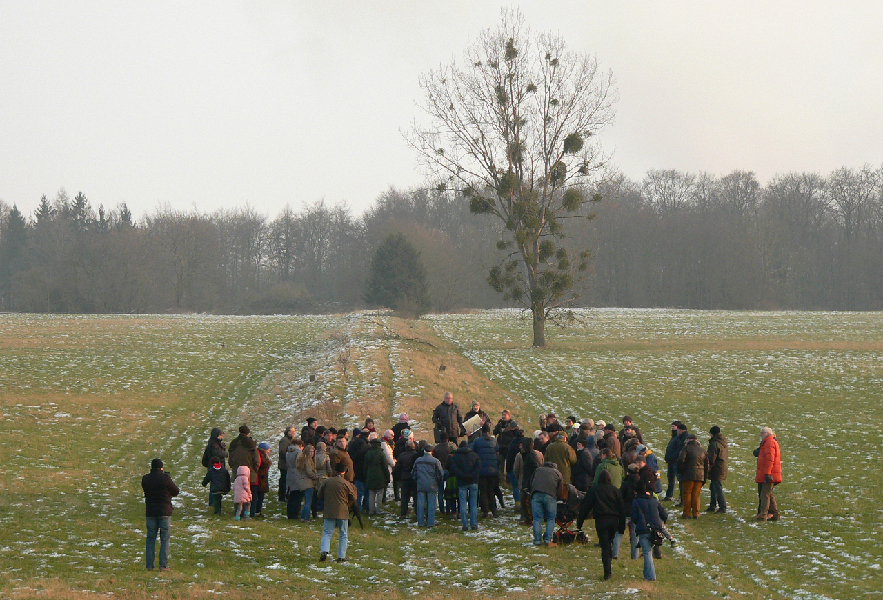 Führung auf dem früheren Reichserntedankfestgelände